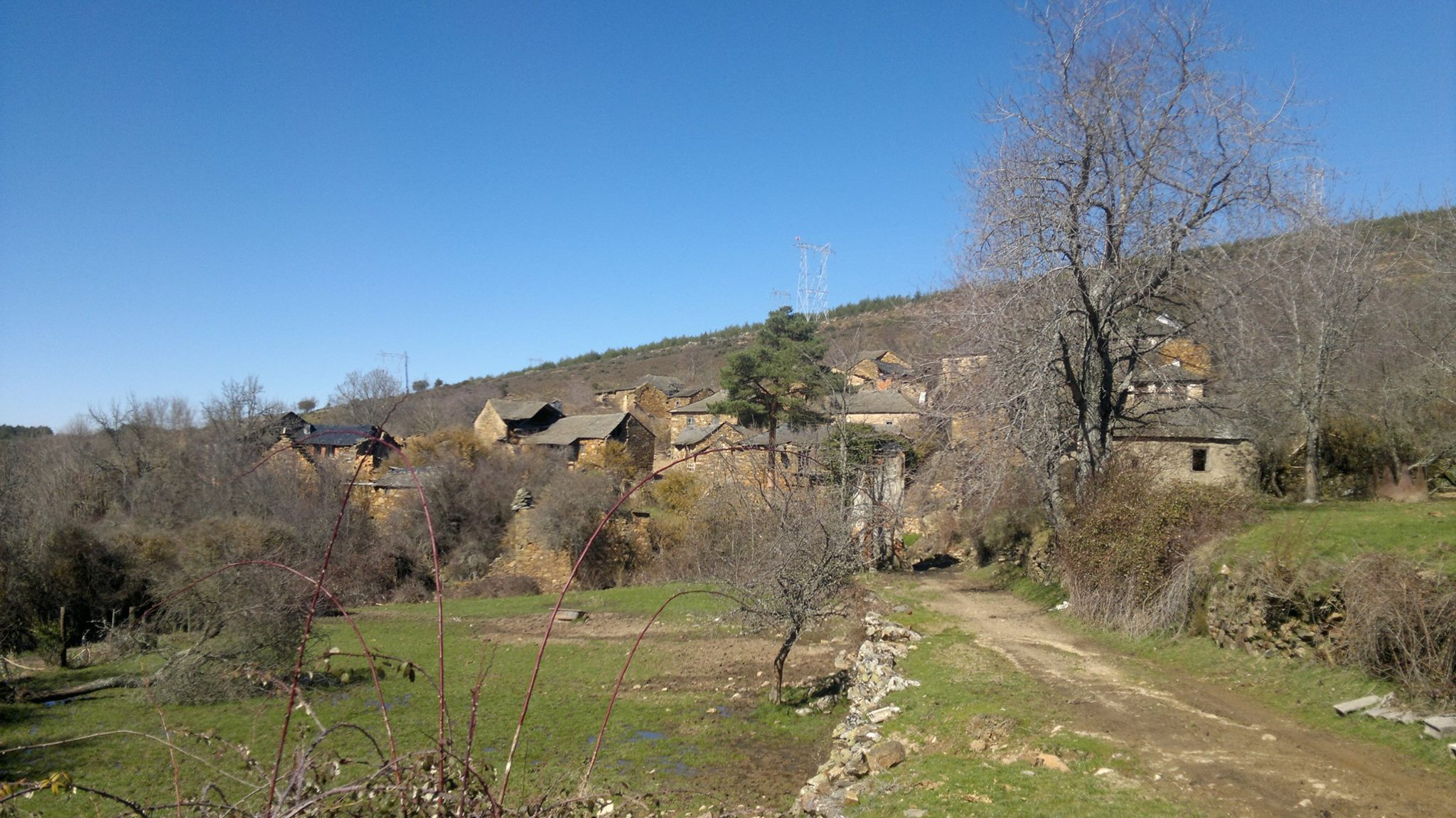 Vista del pueblo